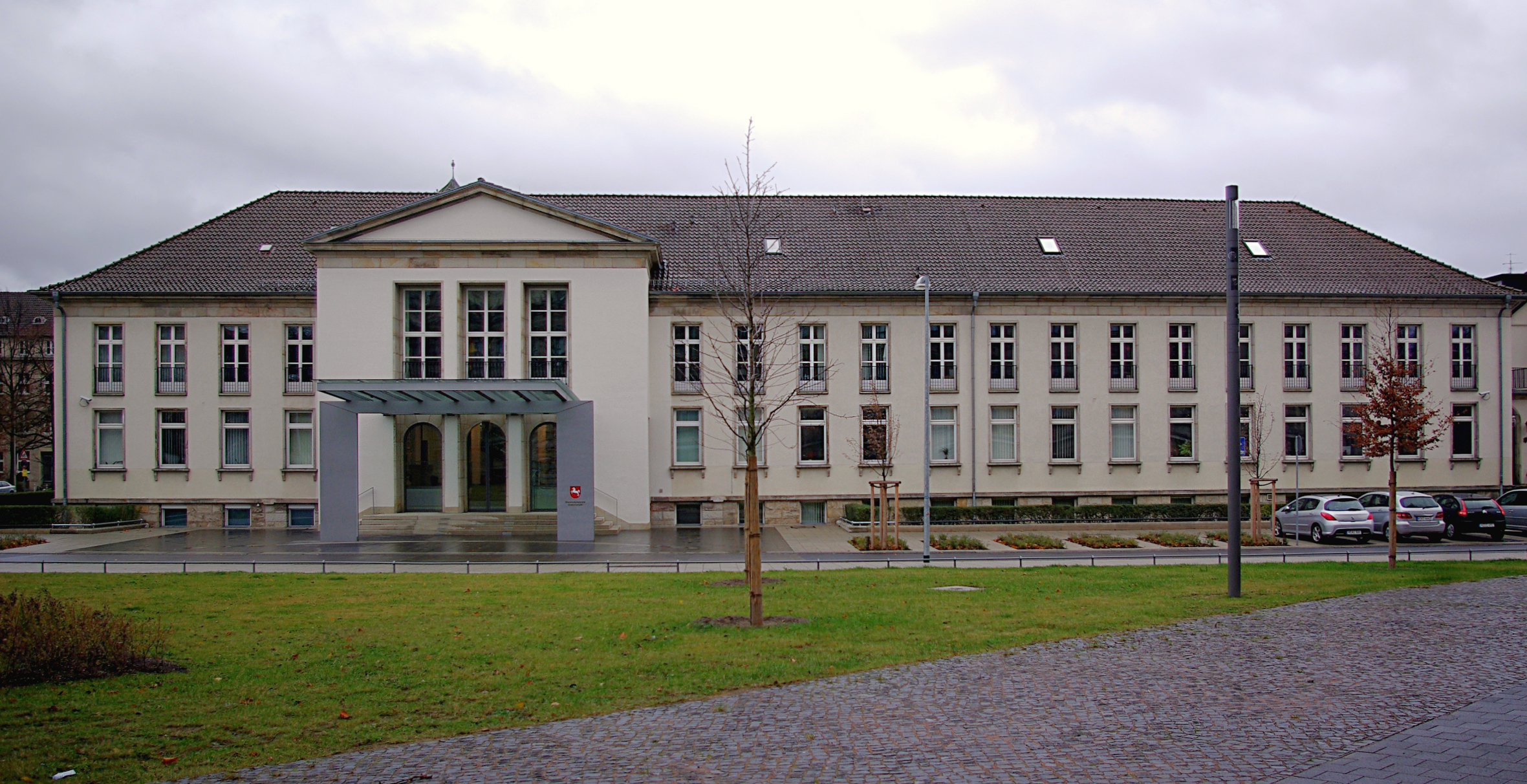 Die Staatskanzlei in Hannover befindet sich nahe dem Landesmuseum und dem Maschsee in der Planckstraße.